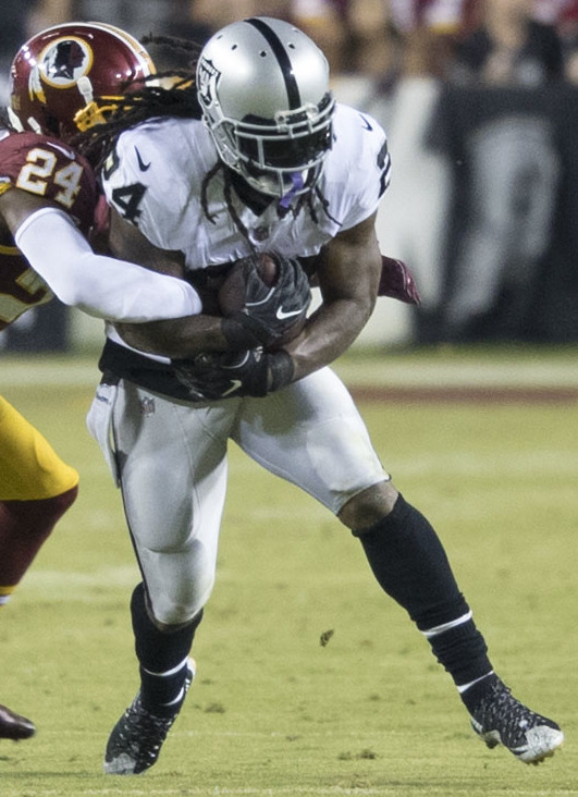 Raiders at Redskins 9/24/17